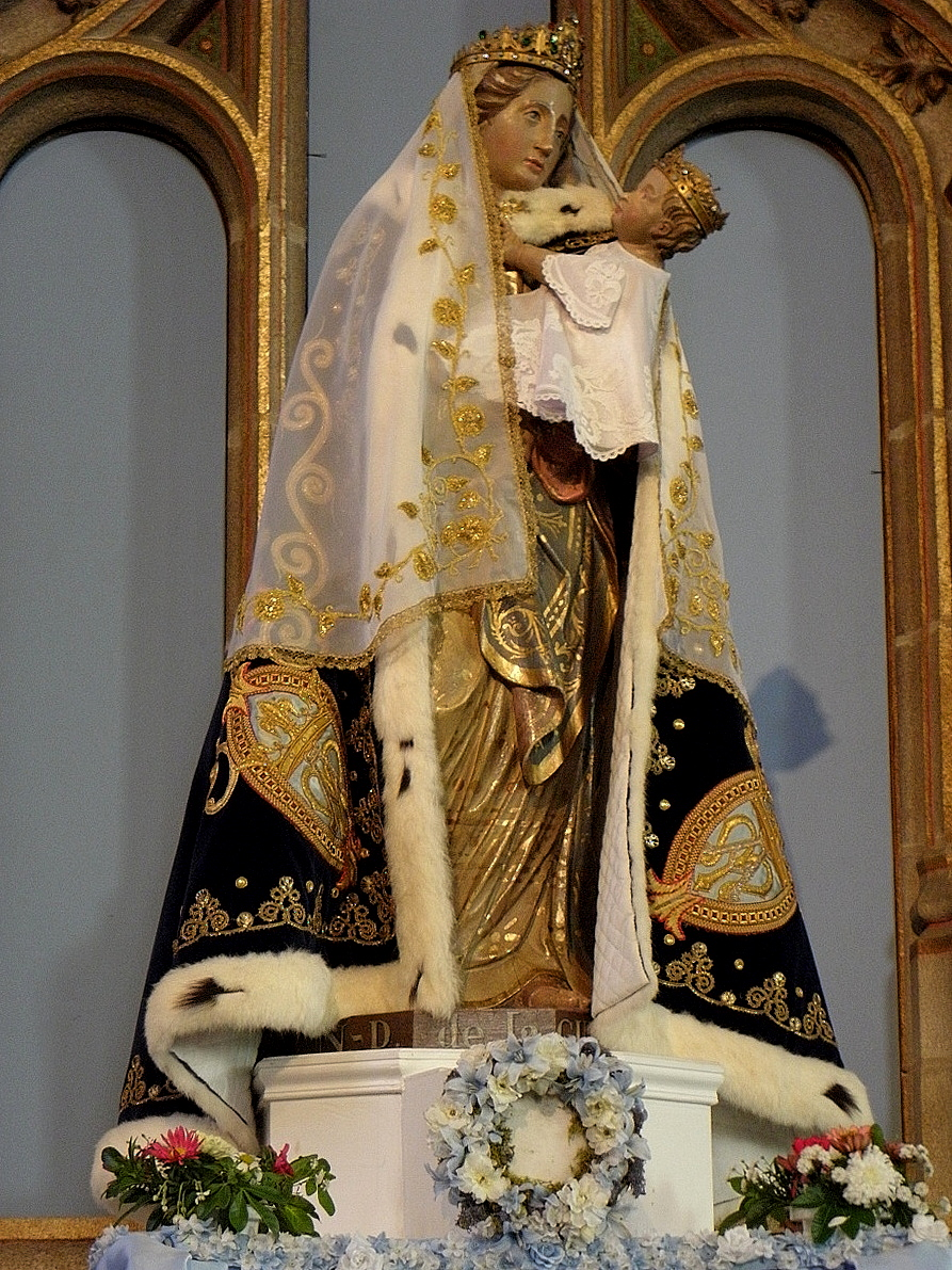 Statue de notre-Dame de La Guerche en la basilique Notre-Dame de La Guerche-de-Bretagne (35).